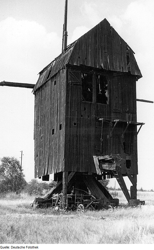 Original image description from the Deutsche Fotothek Zemnick. Bockmühle